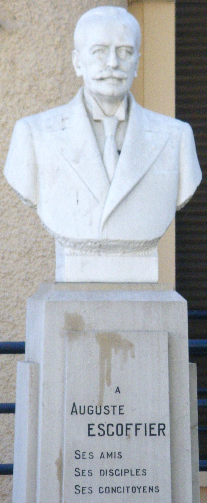 Auguste Escoffier (sa statue à Villeneuve-Loubet) Texte supplementaire sur le socle: "Il fut le grand ambassadeur de la cuisine française - né le 28 octobre 1846 à Villeneuve-Loubet décédé le 12 février 1935 en principauté de Monaco"